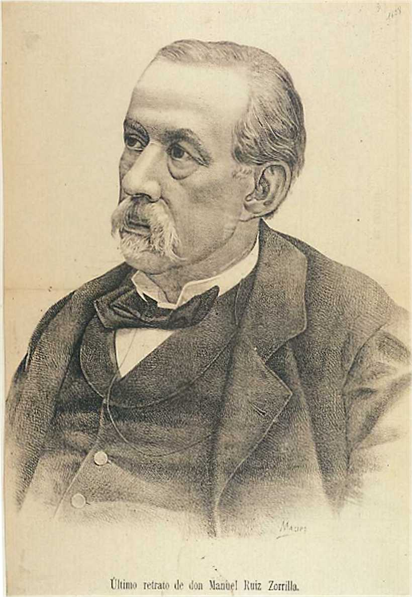 Manuel Luis Zorrilla ultimo ritratto pubblicato su Motín, El (Madrid). 22/06/1895, n. 25, página 2 autore Antonio Macipe Samper